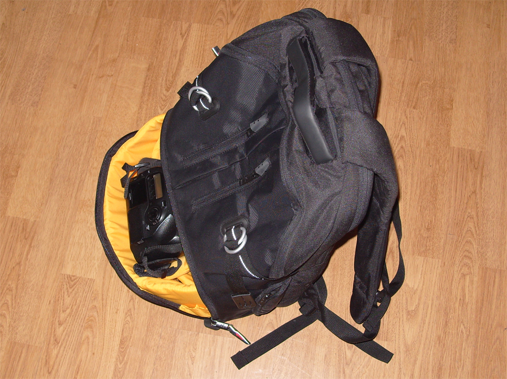 Kameraryggsäck